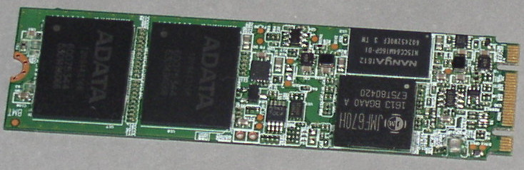 Твердотельный диск объёмом 128 Гб производства ADATA модель IM2S3138E-128GM-B. На плате установлены: - две микросхемы памяти NAND производства ADATA; - микросхема ОЗУ 1 Гб NT5CC64M16GP-DI производства Nanya Technology Corporation (DDR DRAM, 64MX16, 0.225ns, CMOS, PBGA96); - контроллер JMF670H производства JMicron; - дискретные компоненты. Все микросхемы в корпусах BGA.